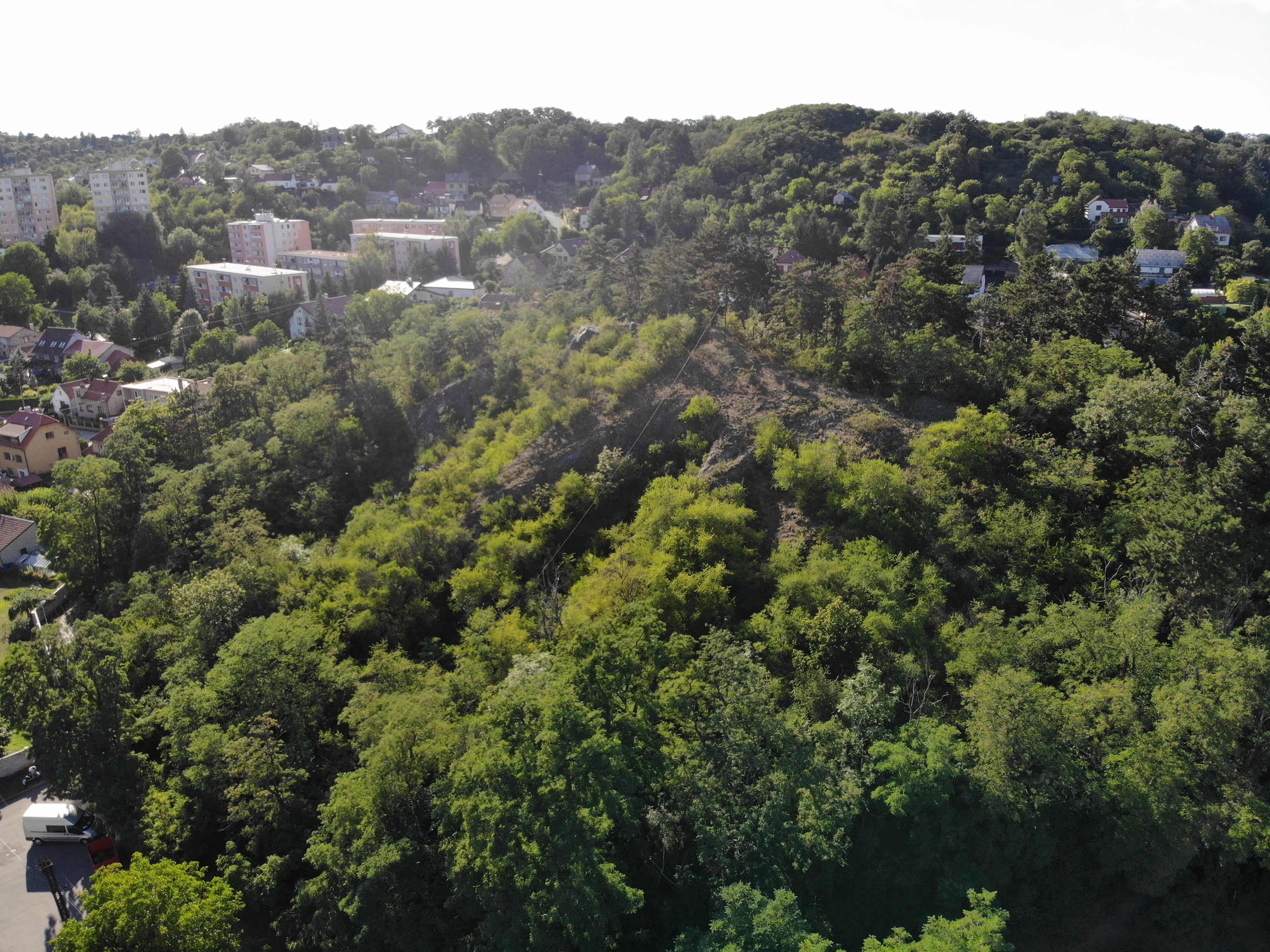 Kameníček focený dronem ze vzduchu